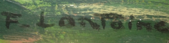 Signature du peintre Fernand Lantoine